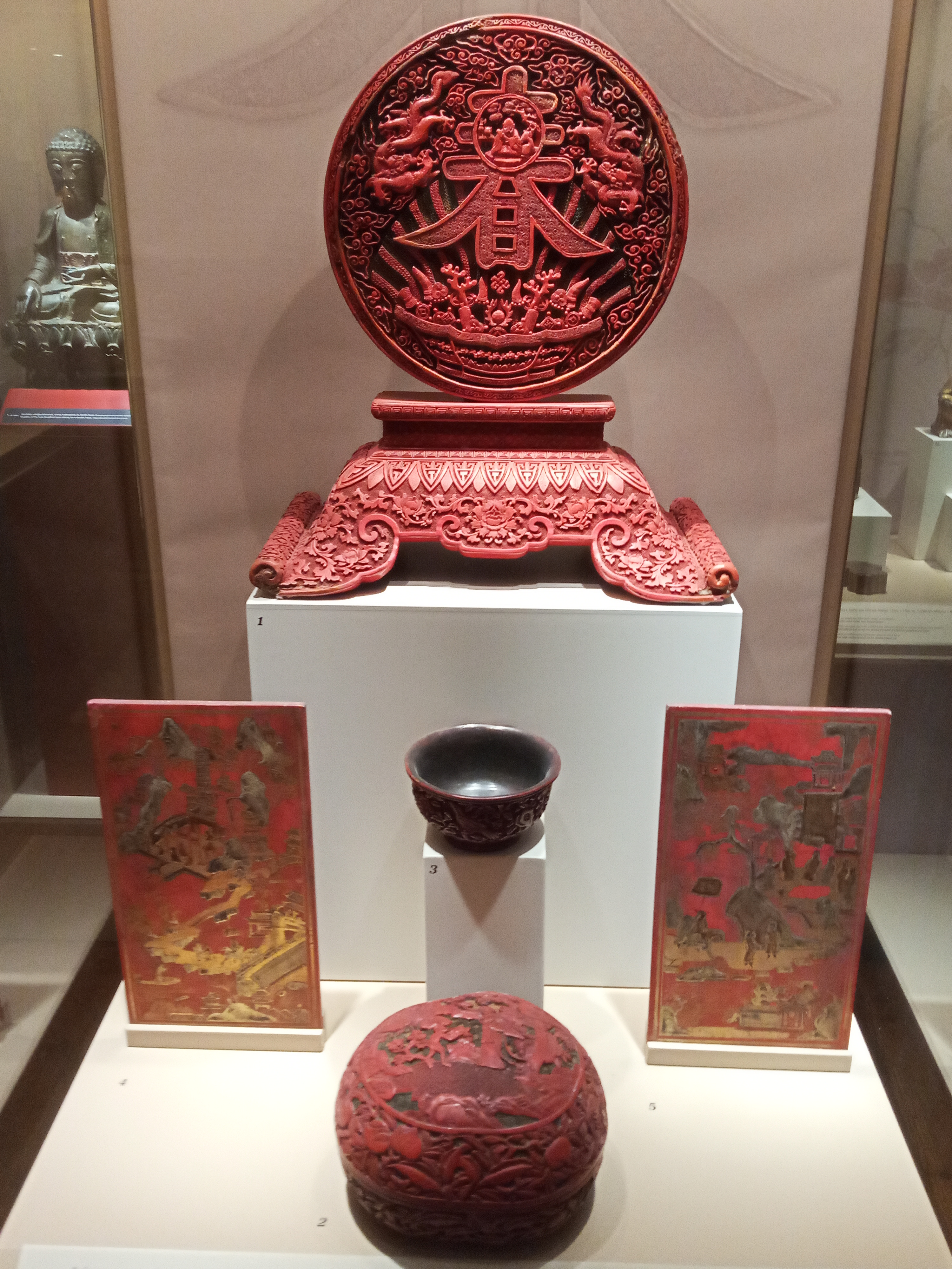 Музей азійського мистецтва Керкіри